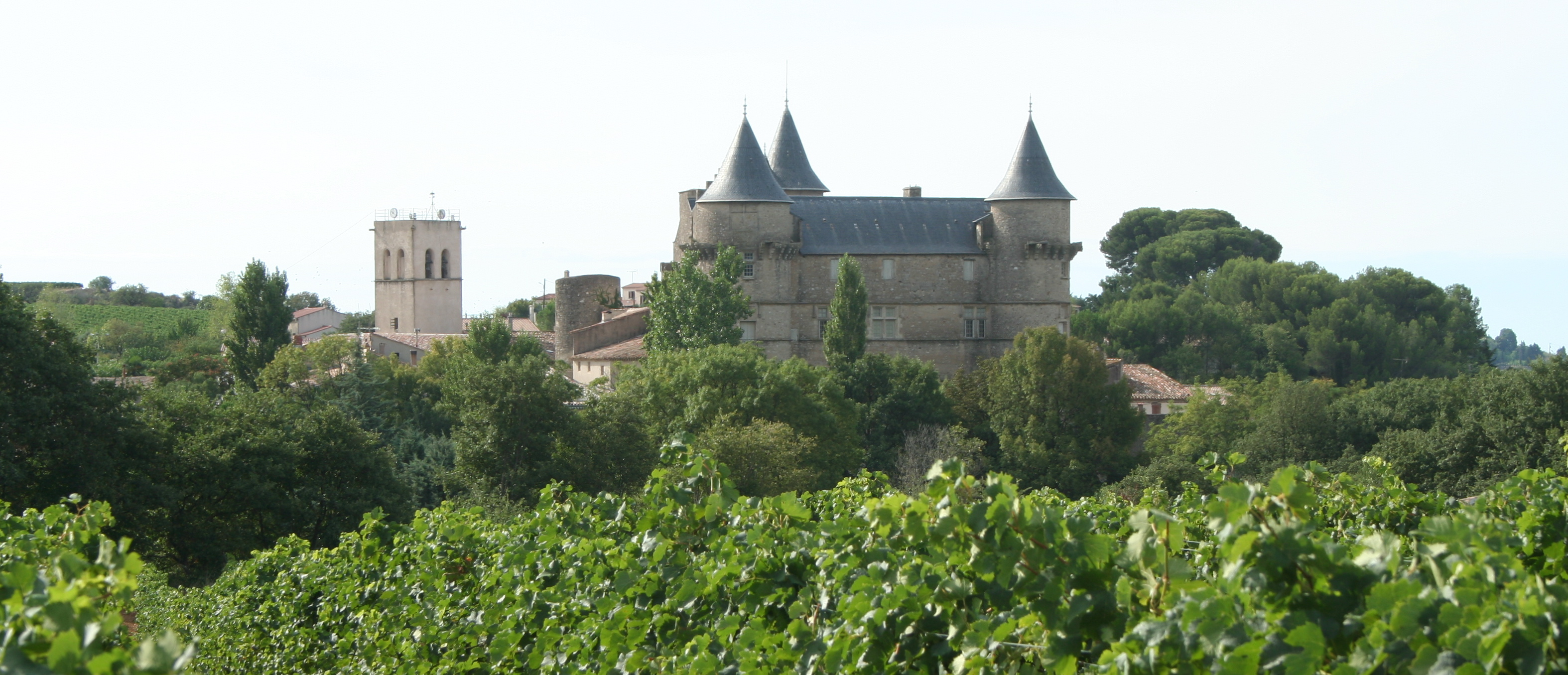 Margon (Hérault) - vue générale sur le village et le château.